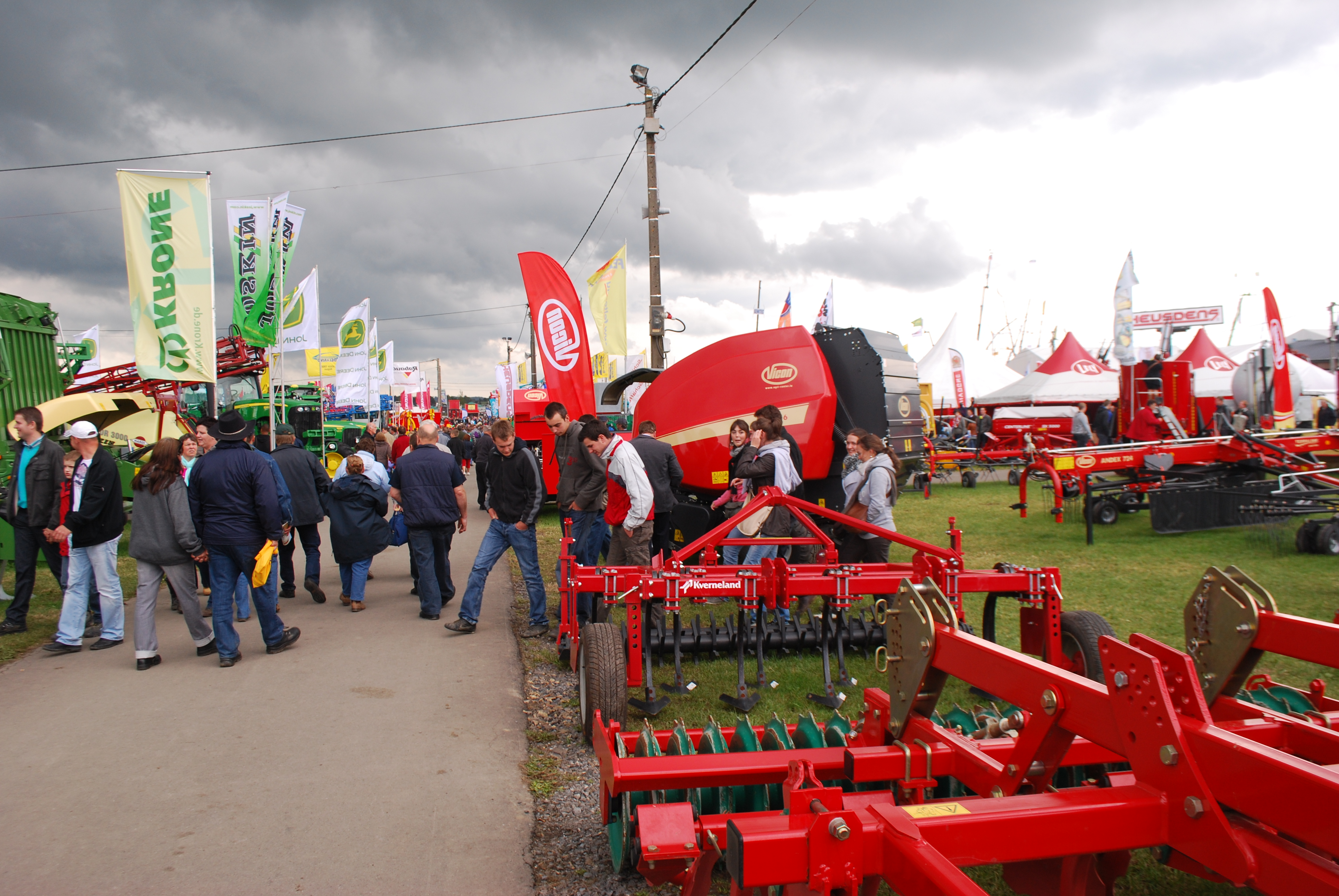 Vue de la foire agricole de Libramont.